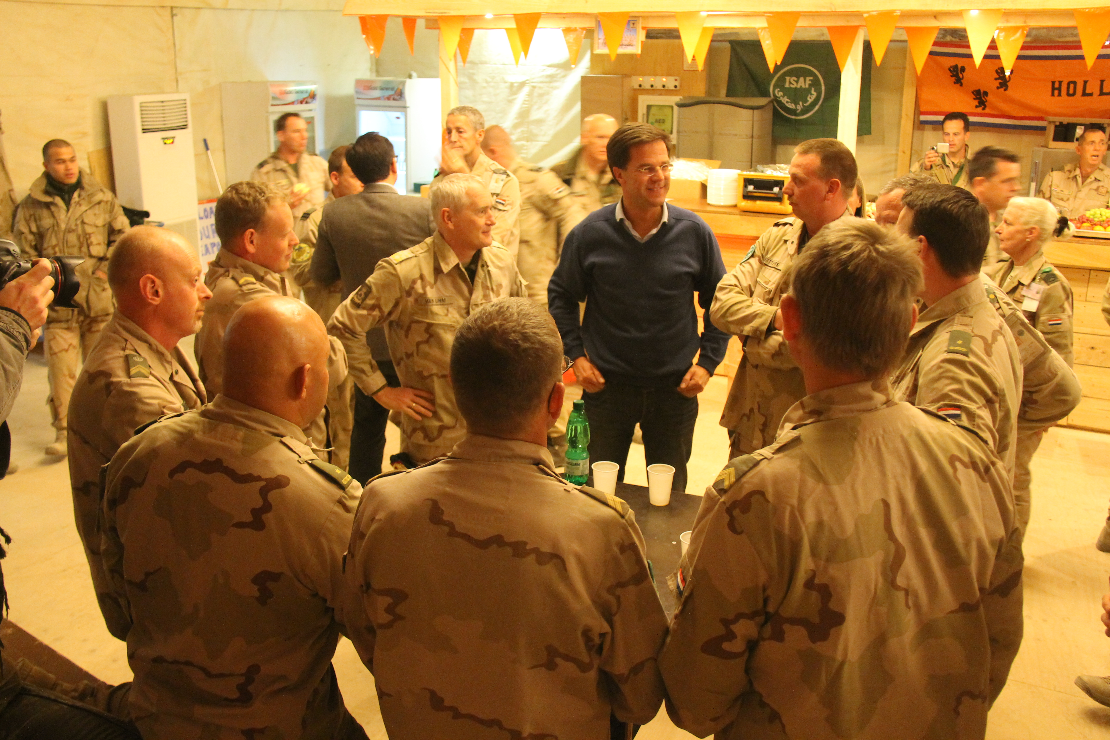 Minister-president Rutte bezoekt de Nederlandse Politietrainingsmissie in Afghanistan. Hij ontmoet onder andere Nederlandse trainers en mentoren van de Afghaanse politie, militairen en civiele experts. Met hen bezoekt hij bijvoorbeeld het politietrainingscentrum in Kunduz waar Afghaanse agenten worden opgeleid. Door de weersomstandigheden kon er op het geplande tijdstip niet gevlogen worden en heeft de delegatie een nachtje extra op Kunduz doorgebracht. Meer informatie over de Nederlandse politietrainingsmissie